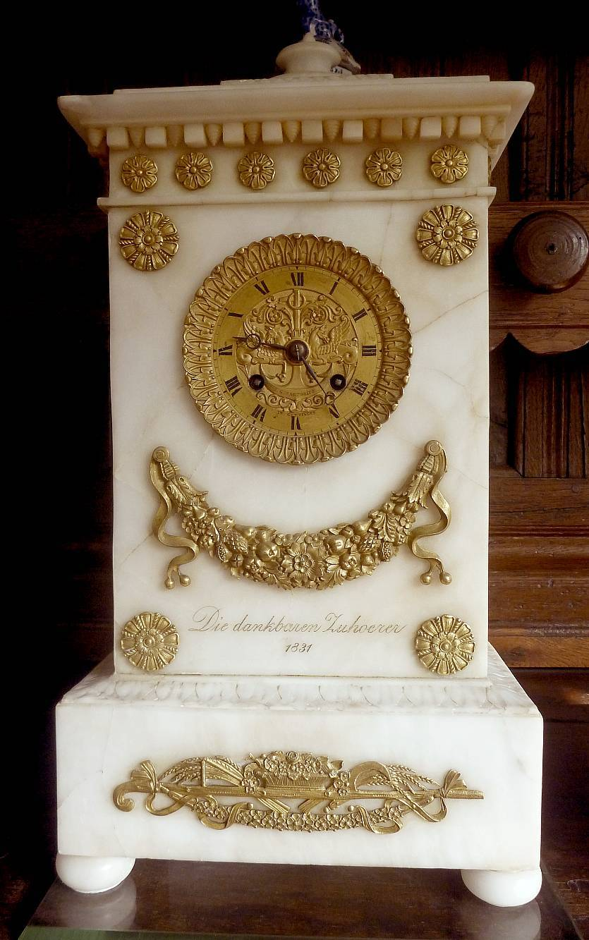 Marmoruhr von 1831